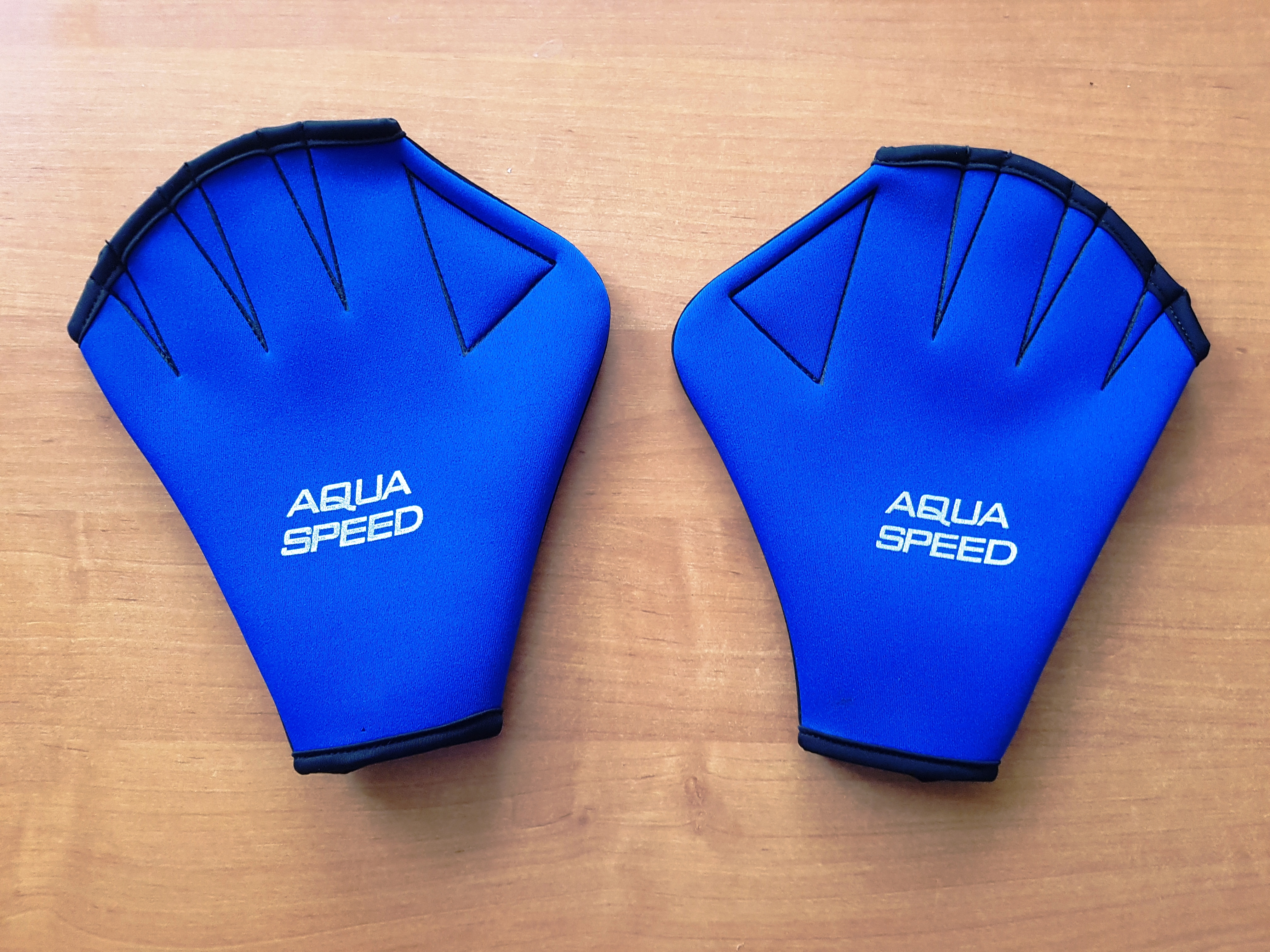 Rękawiczki pływackie Schwimmhandschuhe